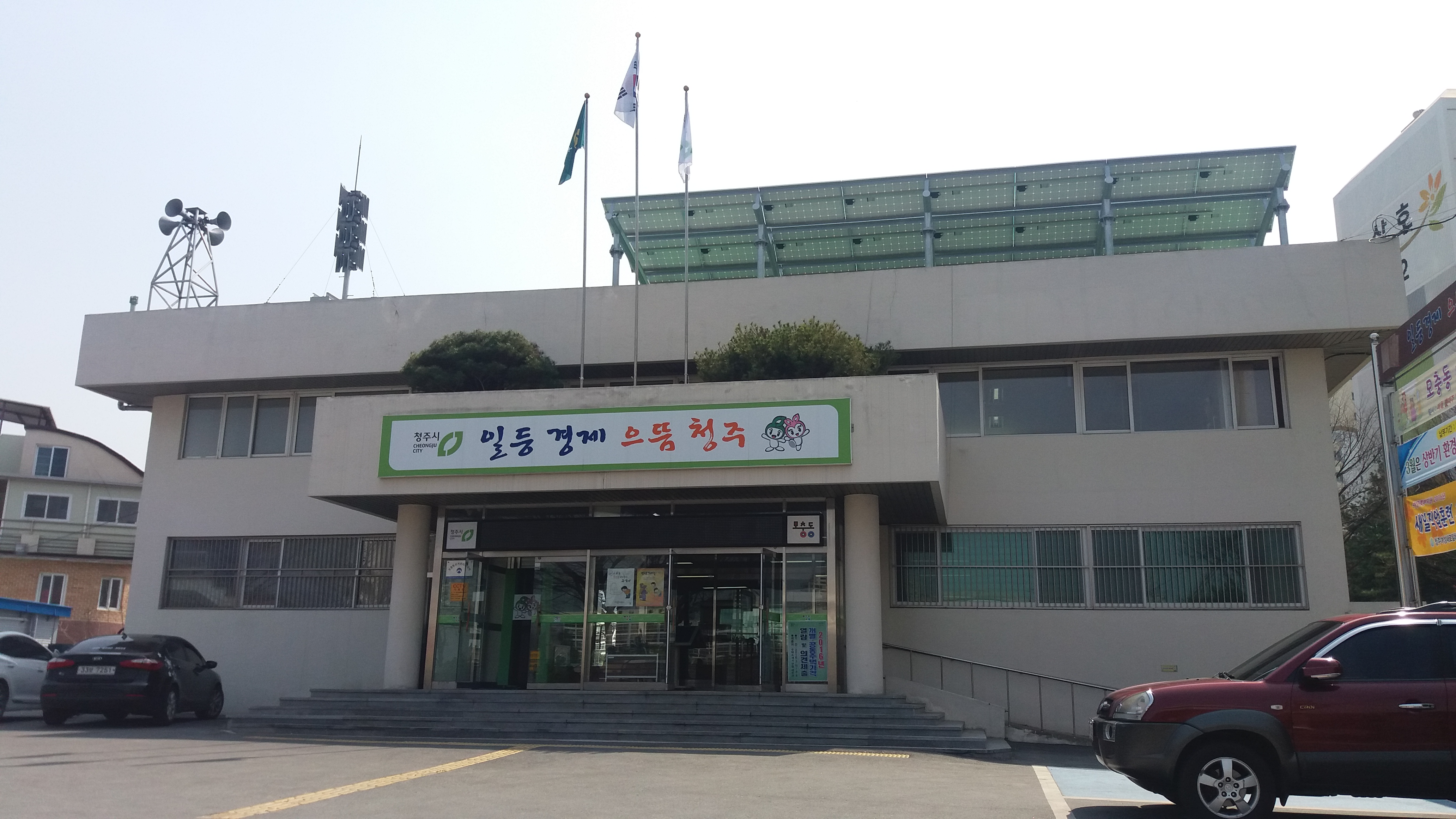 모충동사무소